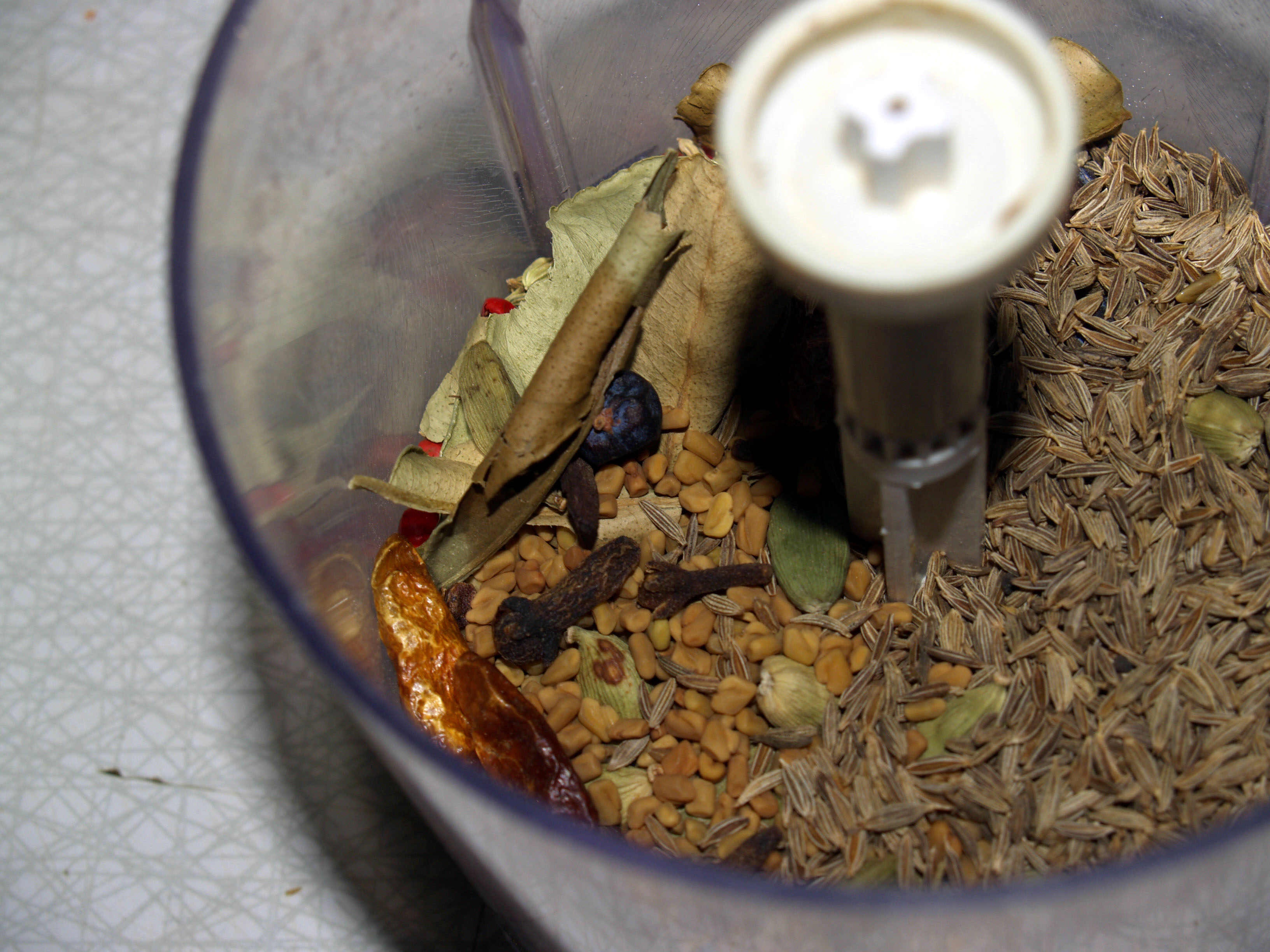 Karry